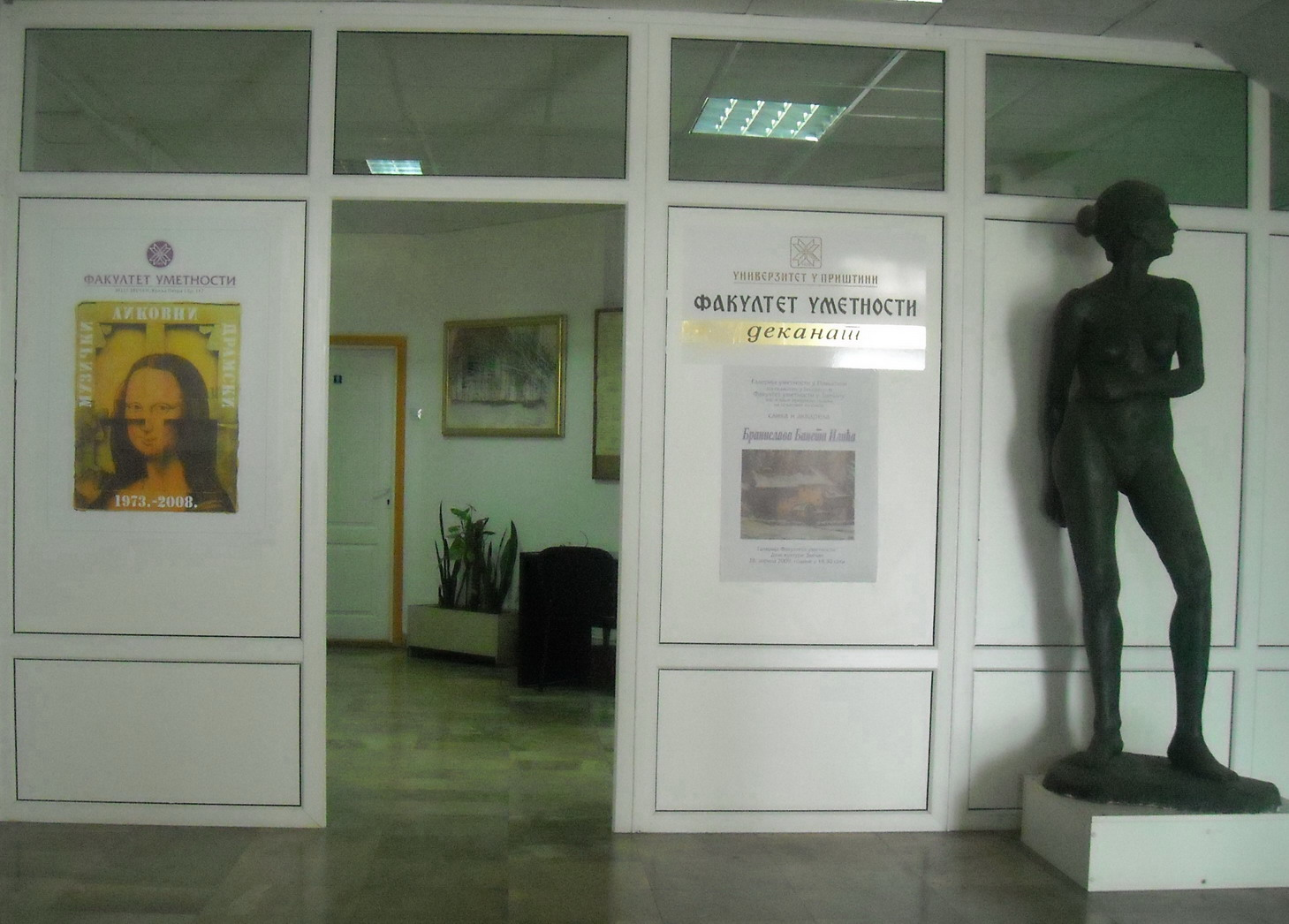 Деканат Факултета уметности Универзитета у Приштини